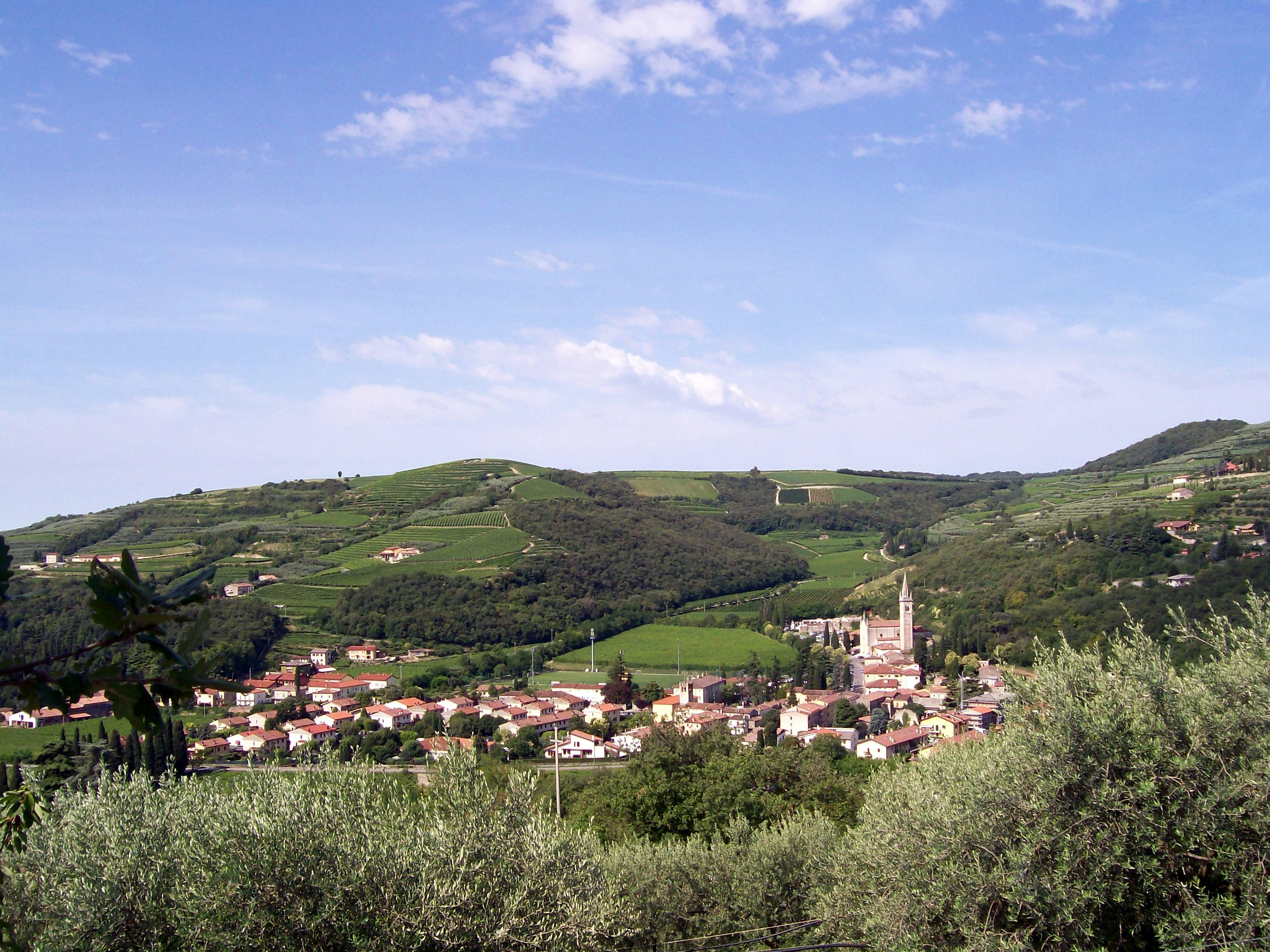 Veduta del paese di Mezzane di Sotto (VR).